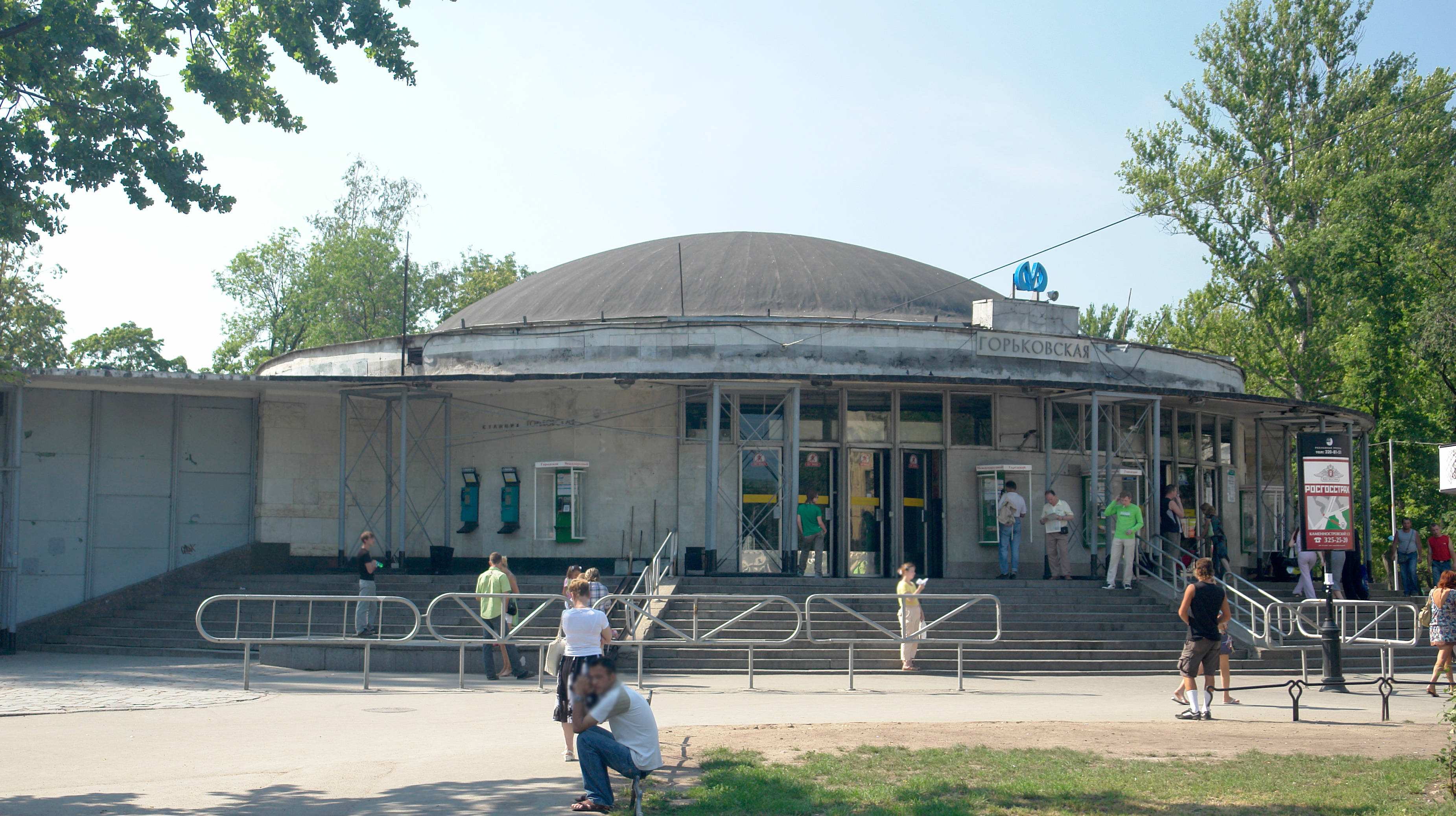 здание станции метро Горьковская (Санкт-Петербург).